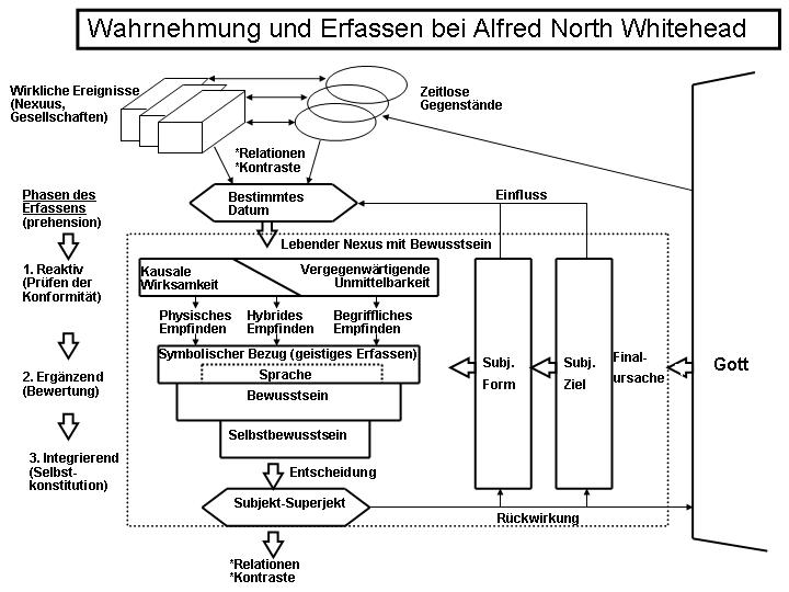 Graphi zur Erläuterung der Struktur des Erfassens bei Alfred North Whitehead